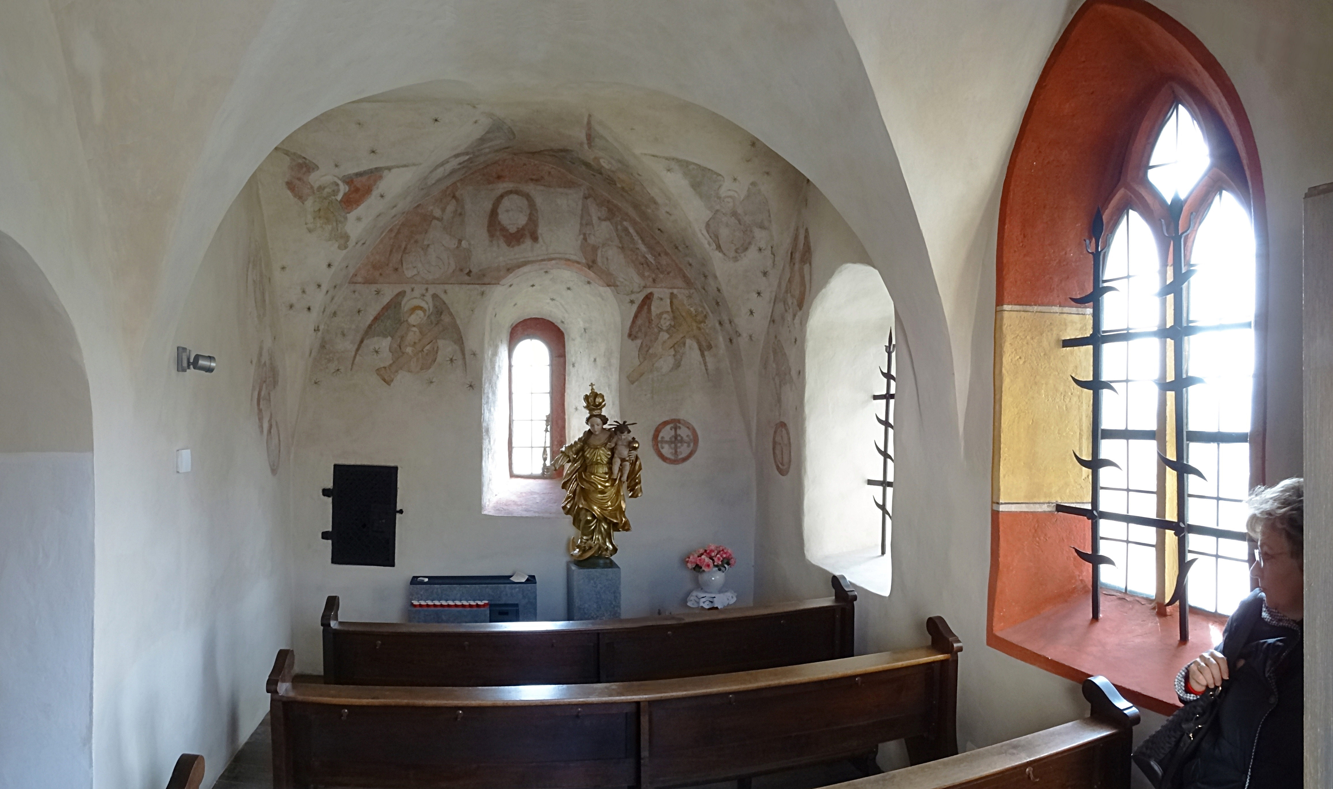 Marienkapelle an der Pfarrkirche St. Johannes der Täufer, Nordheim vor der Rhön